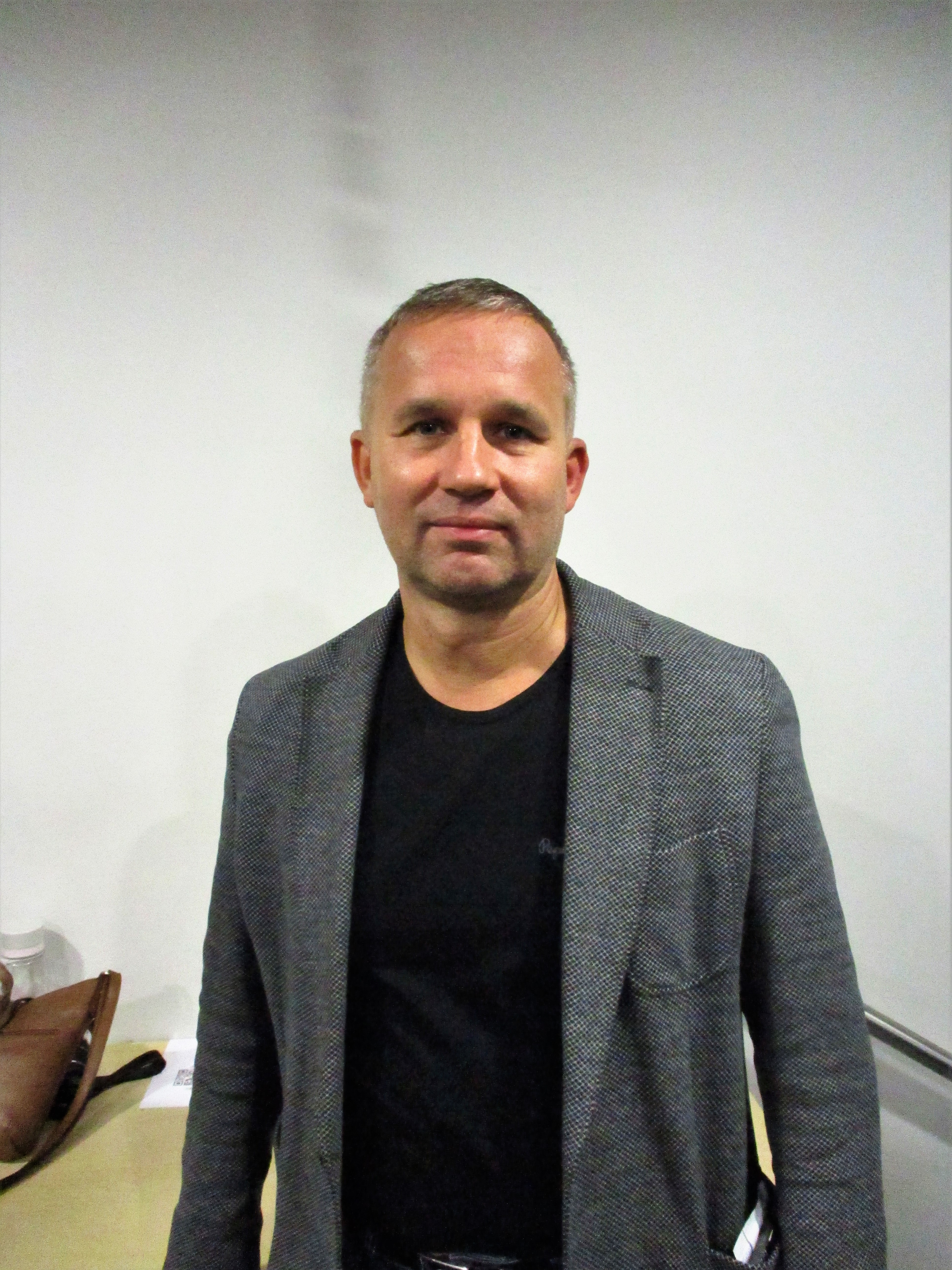 Arno Kütt, Cleveron AS kaasasutaja, veebruar 2018 a.